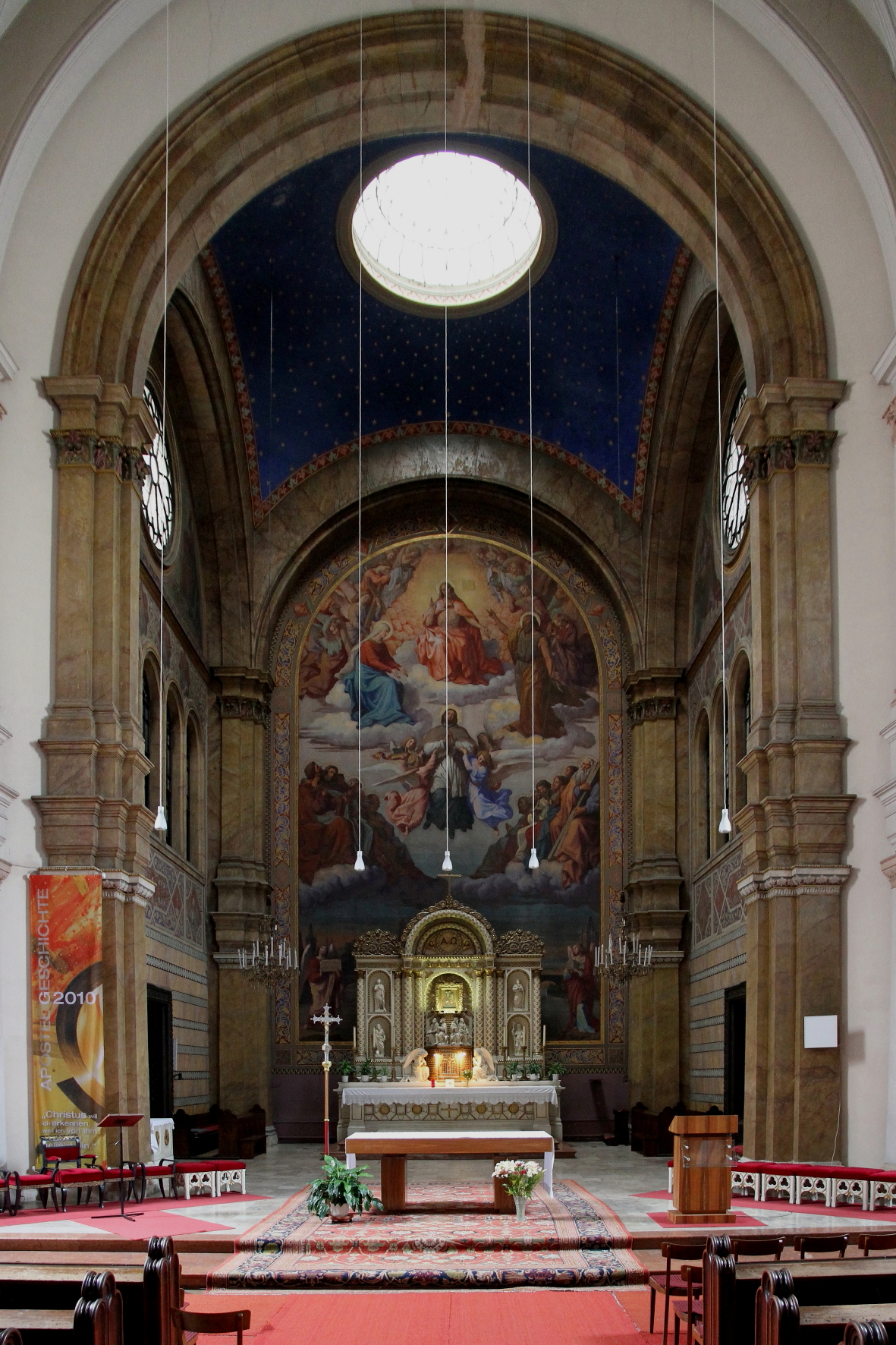 Innenansicht Richtung Altar der Nepomukkirche im 2. Wiener Gemeindebezirk Leopoldstadt mit einem Altarwandfresko von Leopold Kupelwieser.